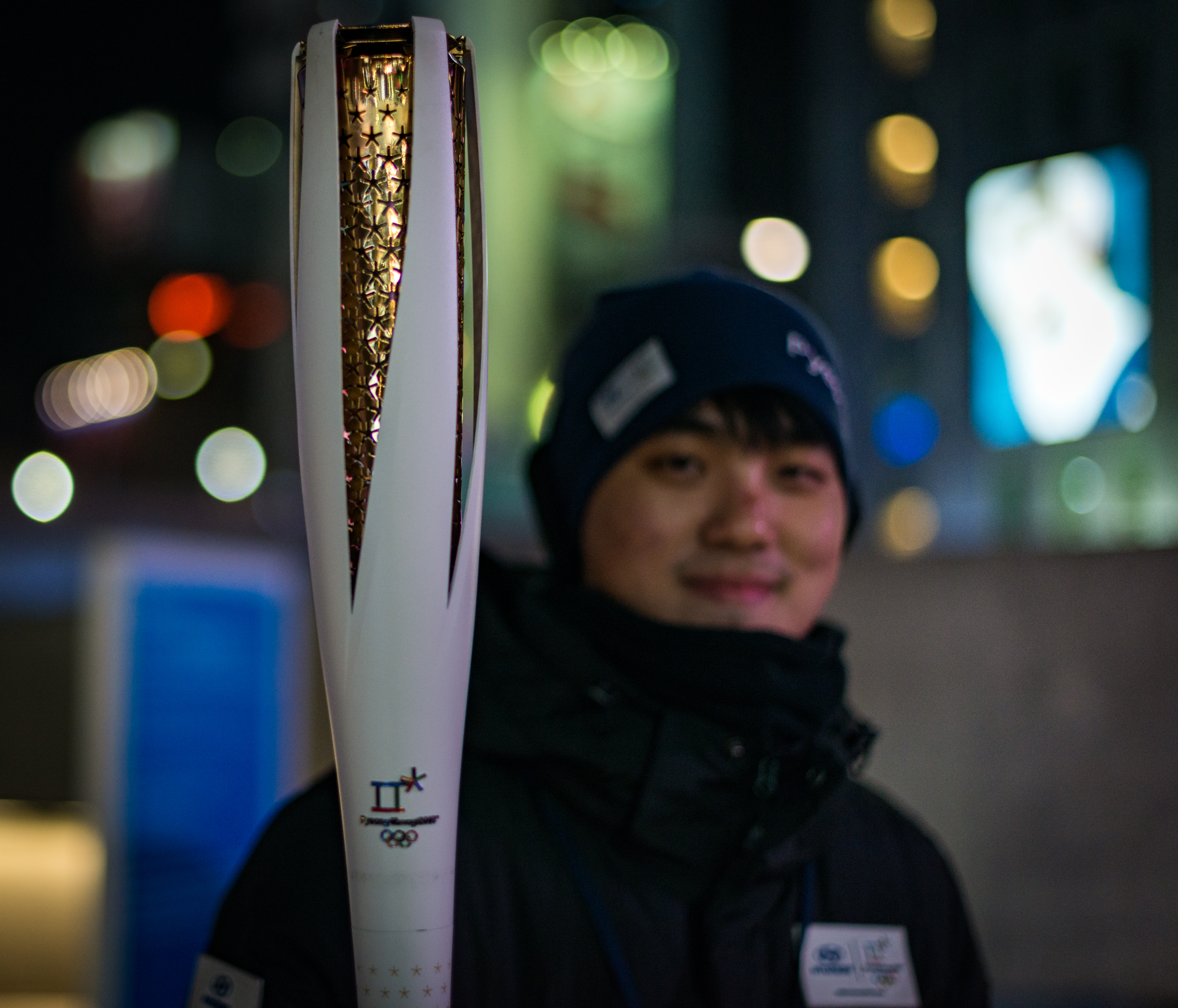 _DSC8043